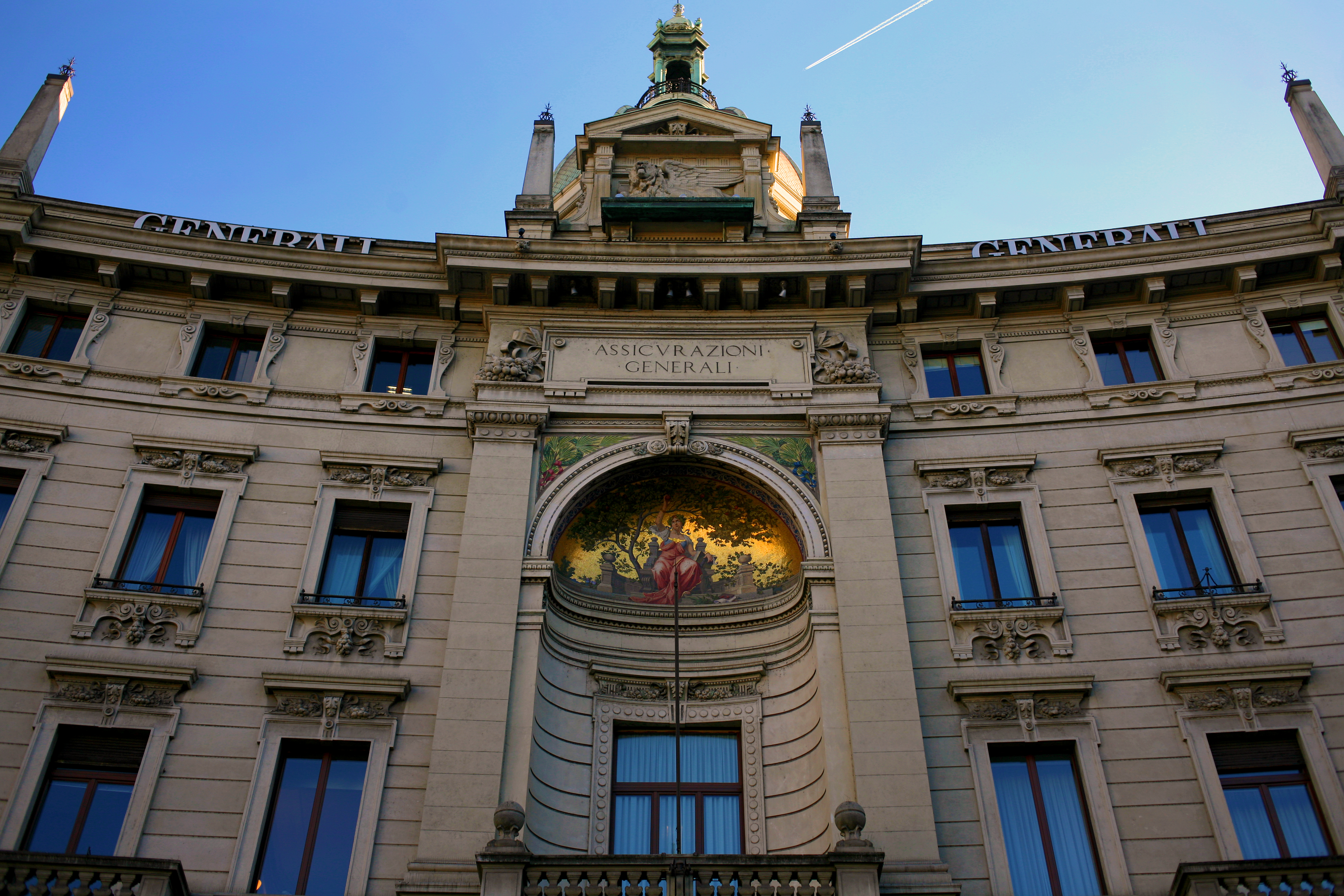 Palazzo delle Generali, piazza Cordusio, Milano (1897-1899), architetto Luca Beltrami. Veduta prspettica di sezione della facciata concava